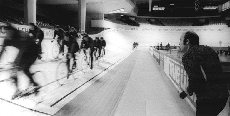 Berlin, Bahnradrennen, Training, Klaus Ampler ADN-ZB Mittelstädt 18-12-74 Berlin: Bald ist es so weit Auf der Winterbahn in der Berliner Werner-Seelenbinder-Halle surren bereits die Räder. Nach der technischen Abnahme des Holzovals wurden am 18.12.74 von den Bahn- und Straßenradsportlern die ersten Runden gedreht. Straßenradsporttrainter Klaus Ampler (r.) beobachtete seine Schützlinge und stoppte erste Trainigszeiten. Mit dem Weihnachtspreis wird am 26. Dezember die Serie der Abendveranstaltungen eingeläutet. Abgebildete Personen: Ampler, Klaus: Radrennfahrer, DDR (GND 131439561)